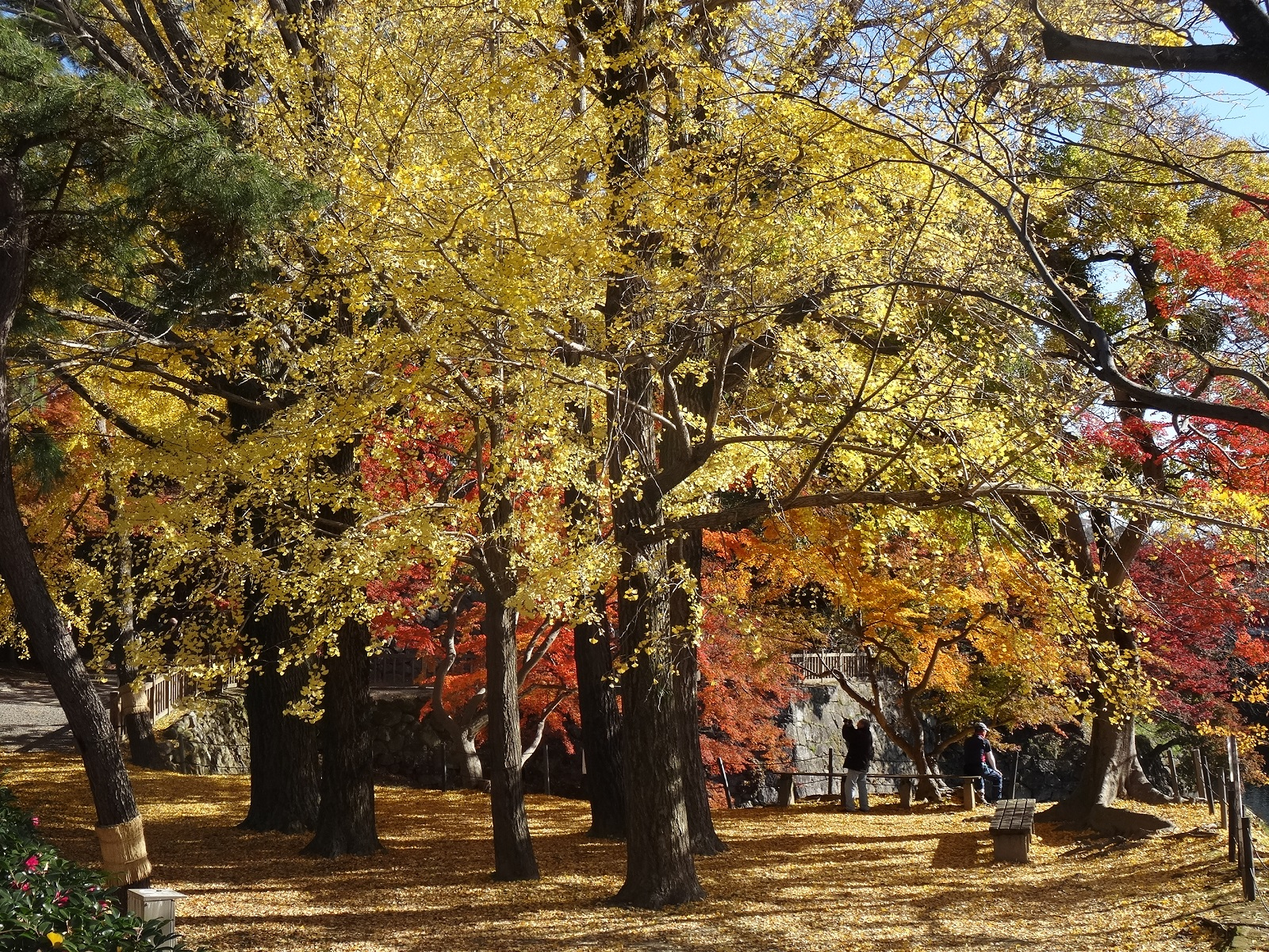 岡崎公園、お堀端にあるイチョウ（愛知県岡崎市）